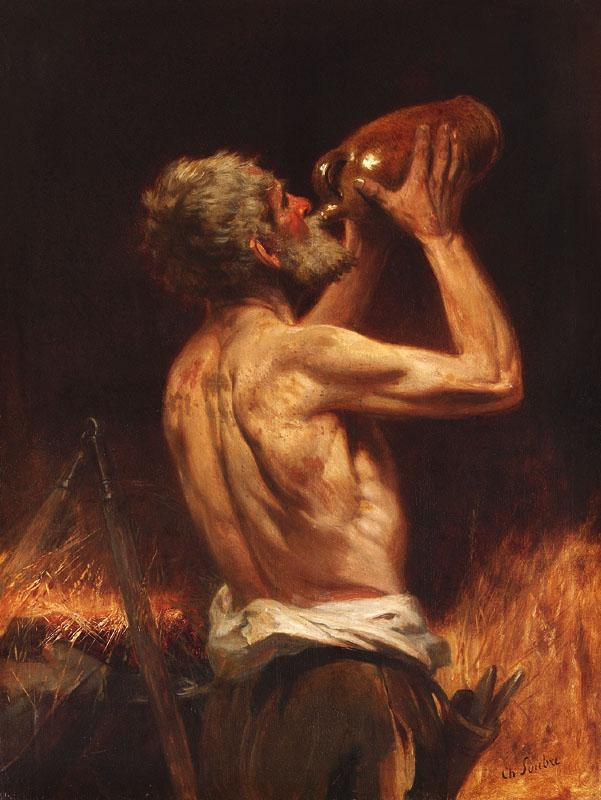 Le faucheur asoiffé